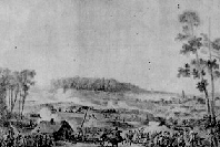 Bitwa pod Zieleńcami 1792